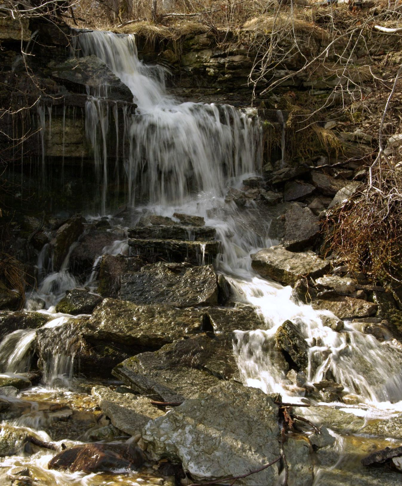 asub Kersalu külas Kloogaranna-Paldiski mnt. ääres